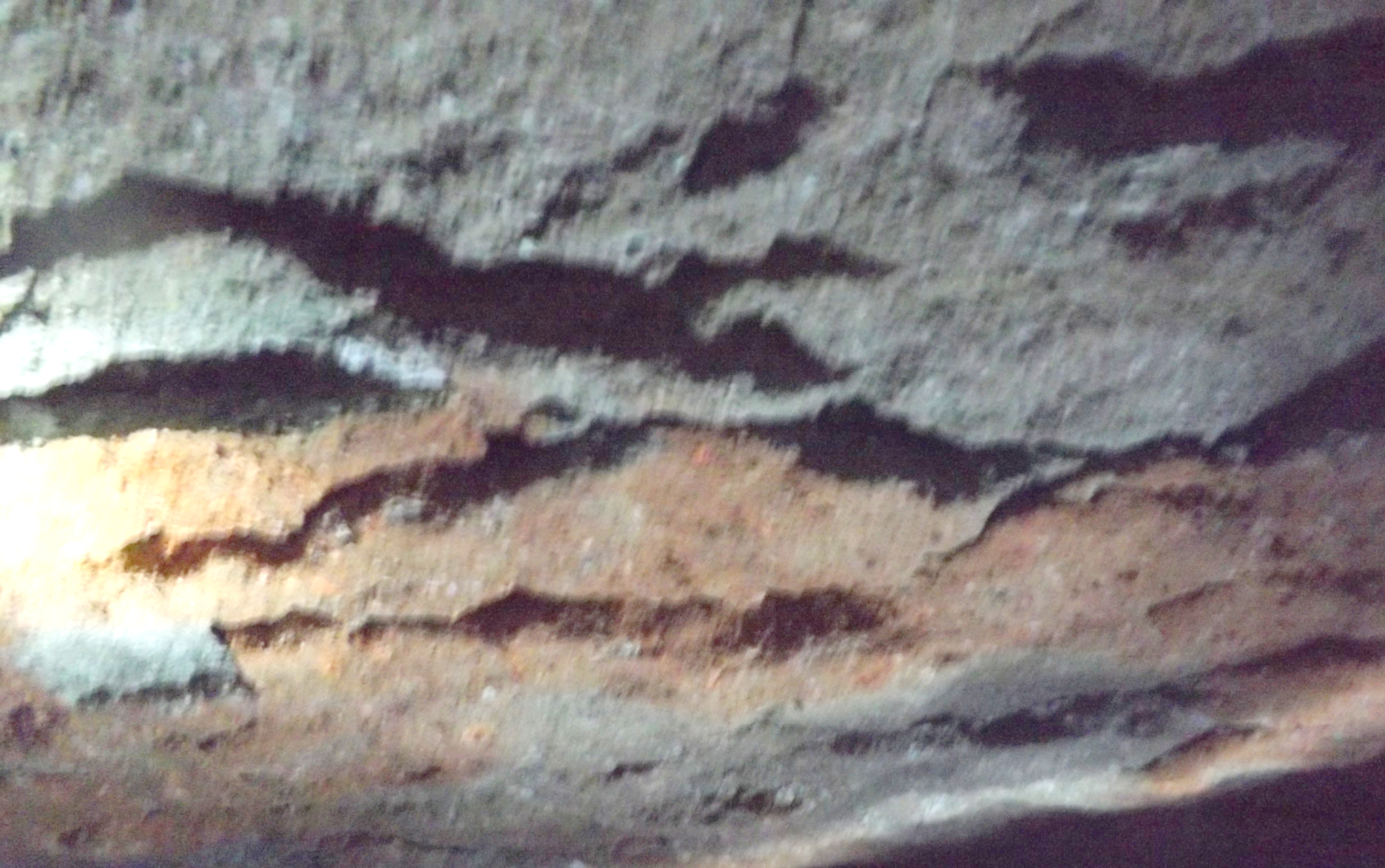 A Léleklyuk-barlang mennyezetének részlete